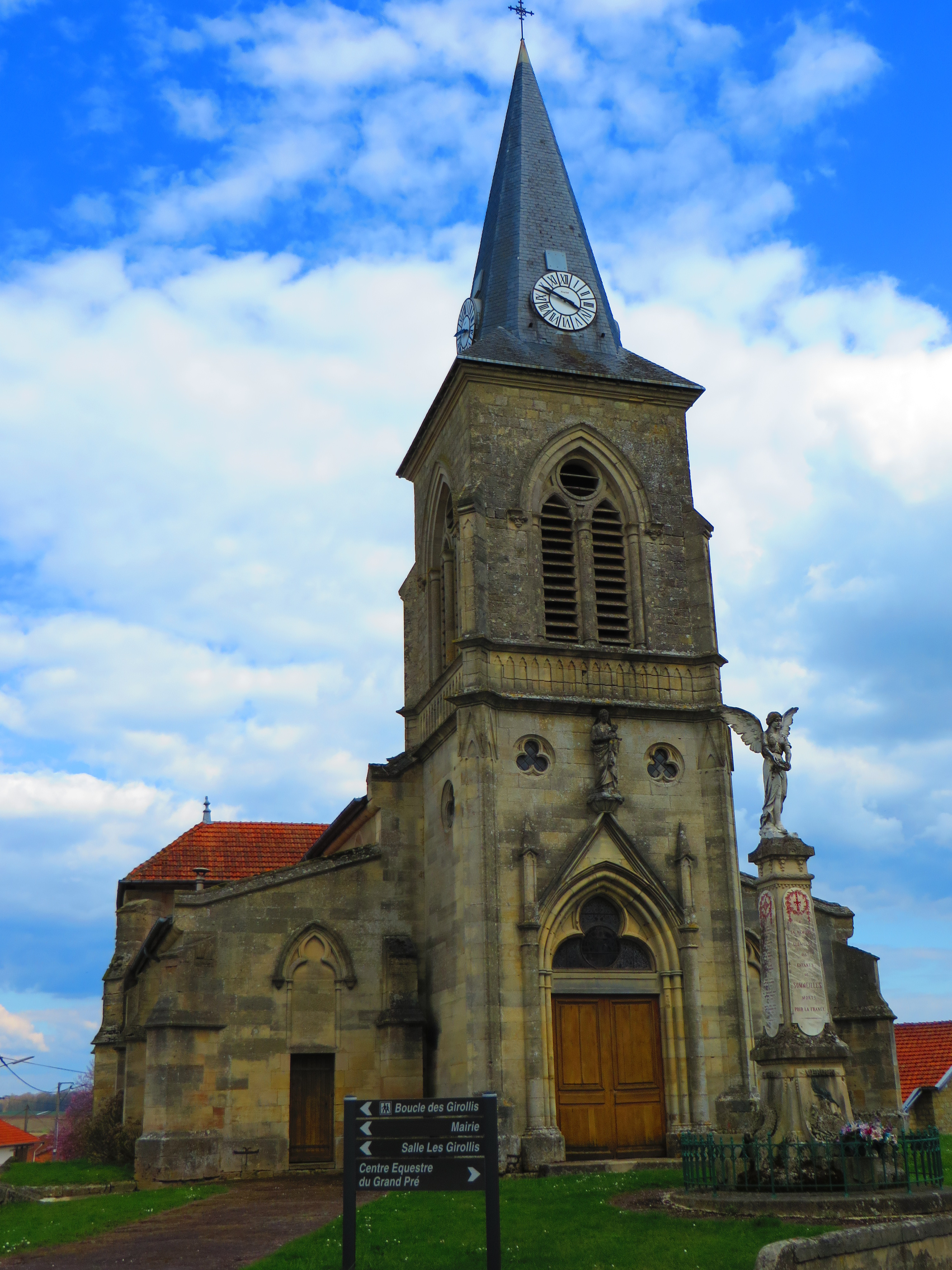 Sommeilles L'église Saint-Didier